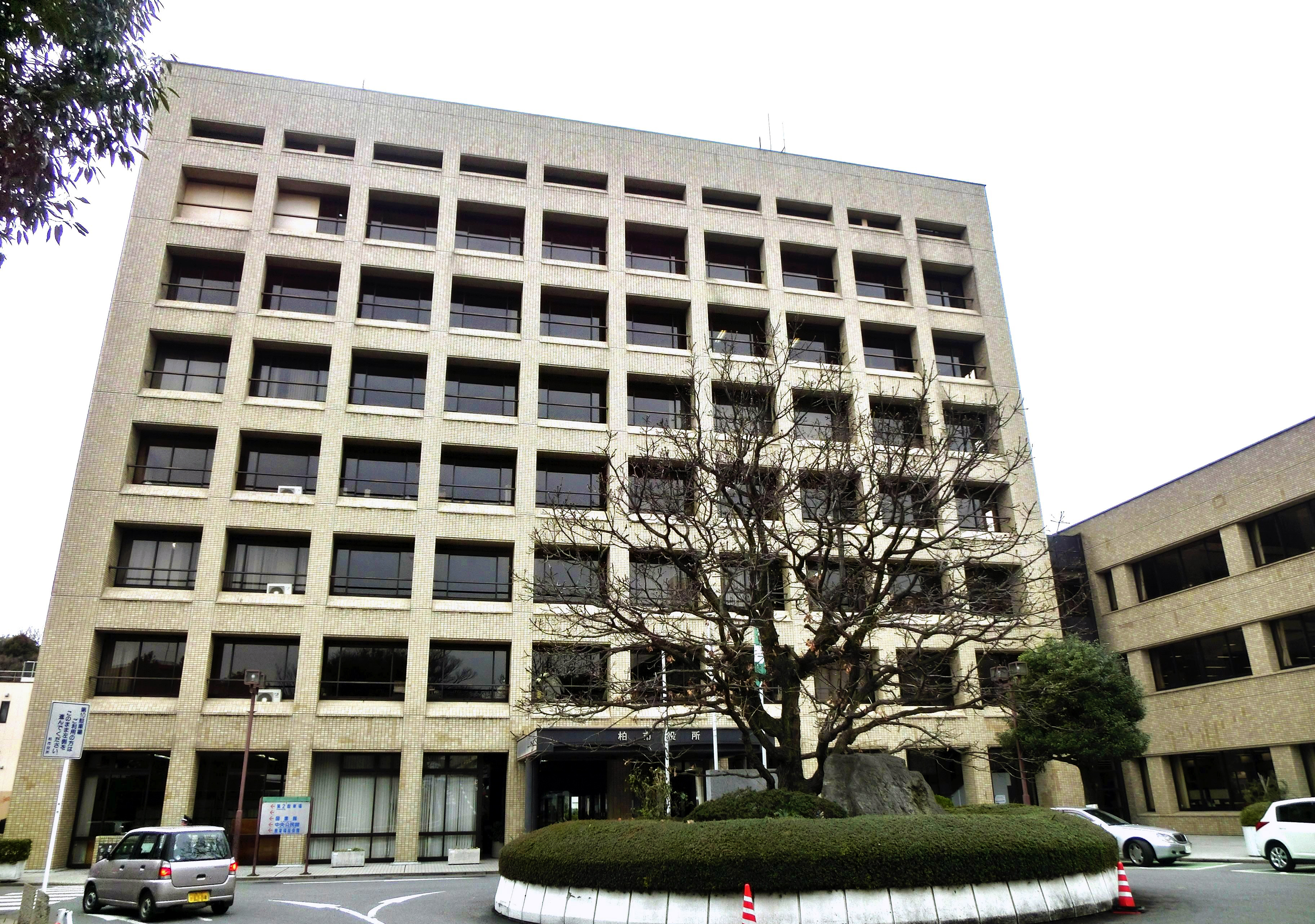 柏市役所 本庁舎